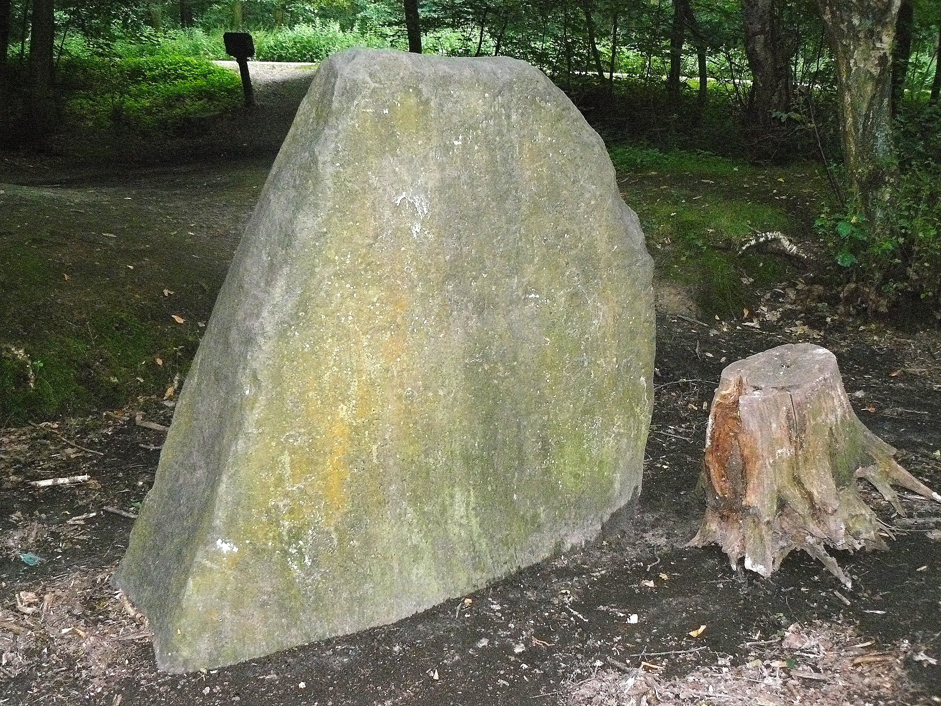 La Pierre de Chalais, dite La Pierre aux Moines, menhir situé dans le Bois de Clamart (Forêt de Meudon), Hauts-de-Seine, France